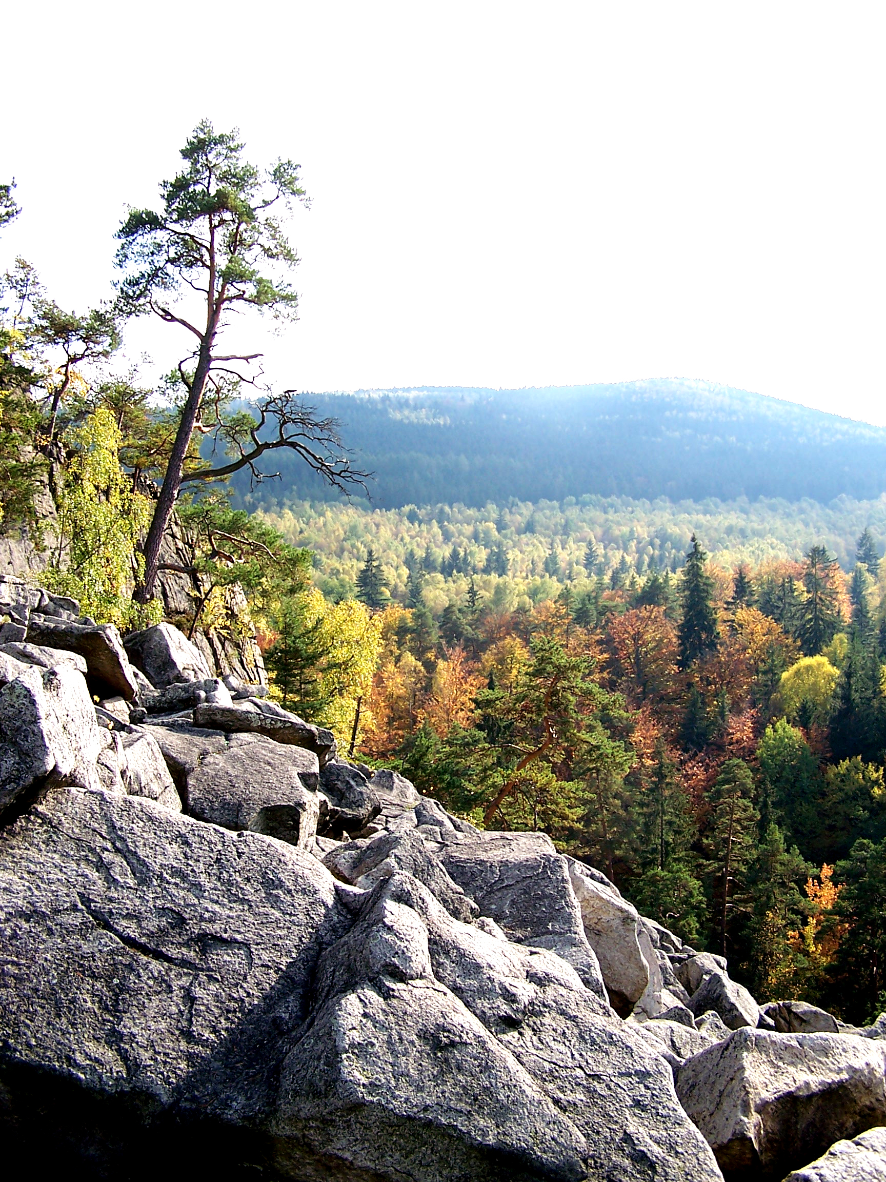 Čertova stěna (NPR Čertova stěna-Luč), pohled z Vyhlídky jižním směrem na Loučovice